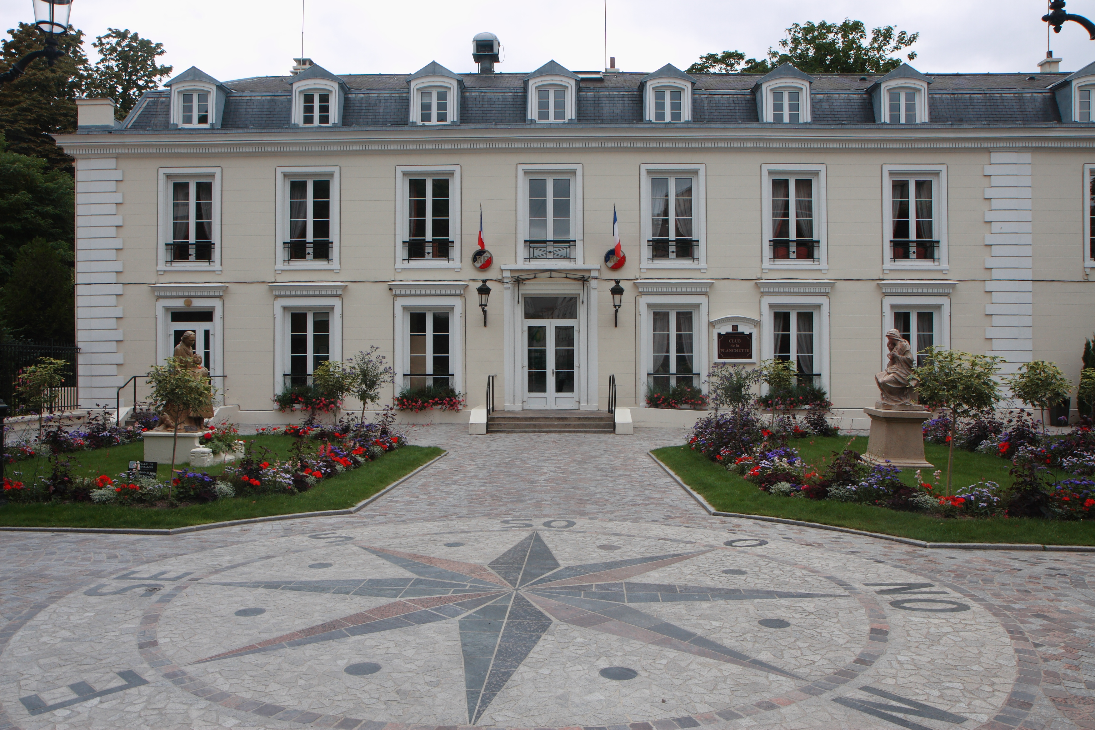 Parc de la Planchette-Louise Michel